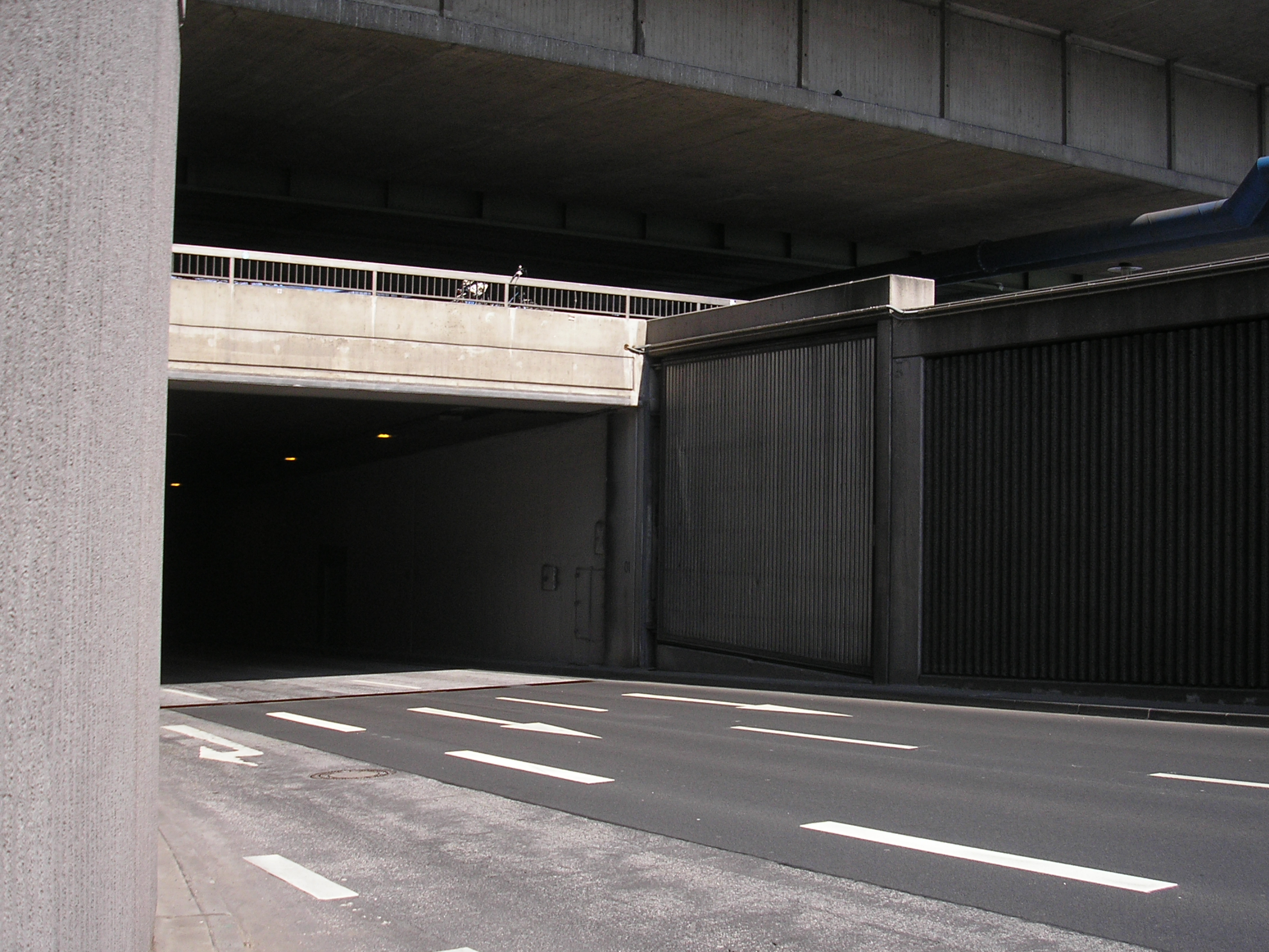 Rheinufertunnel Köln, Südportal, Fahrbahn Richtung Süden, Fluttor